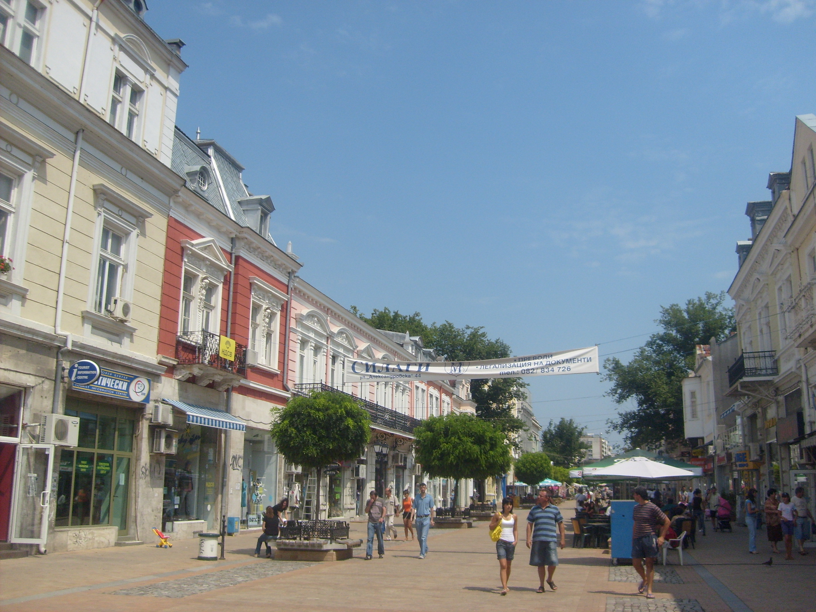 Ruse, Bulgaria